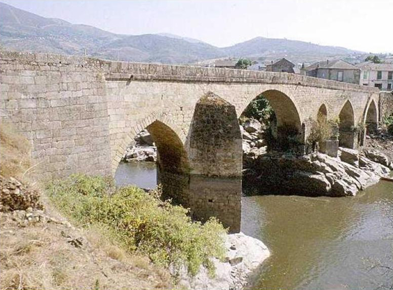 Está situado sobre el río Sil, entre los municipios de A Rúa y Petín, en la provincia de Ourense. Este puente consta de 5 arcos. Dando largos paseos desde la niñez, es hoy en día un lugar privilegiado para los que hemos crecido a su lado. Un saludo de una petinesa. Belén Rguez